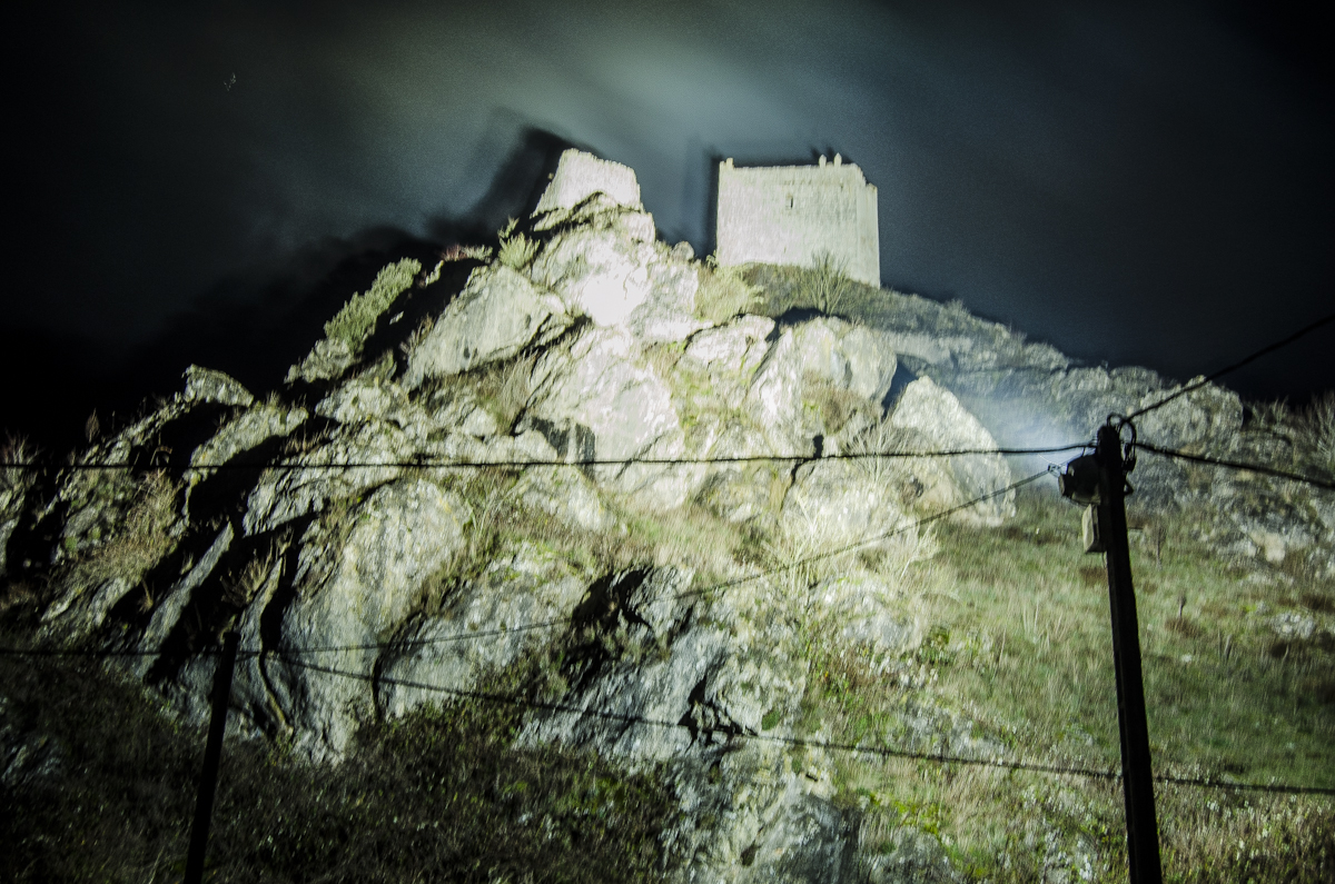 Nocturna del castillo de Úrbel. Úrbel del Castillo (Burgos). Diciembre de 2014